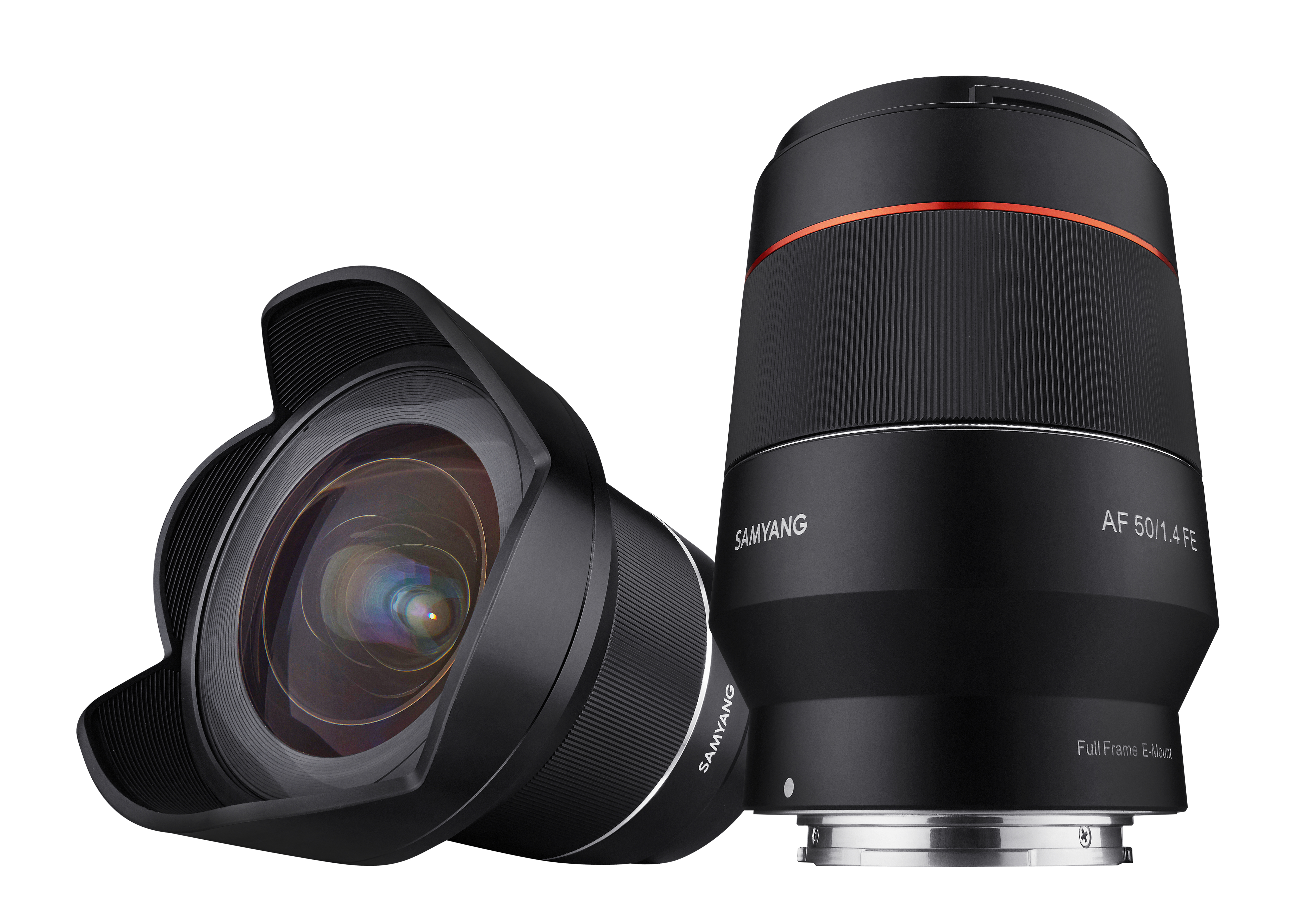 SAMYANG AF 14mm & 50mm